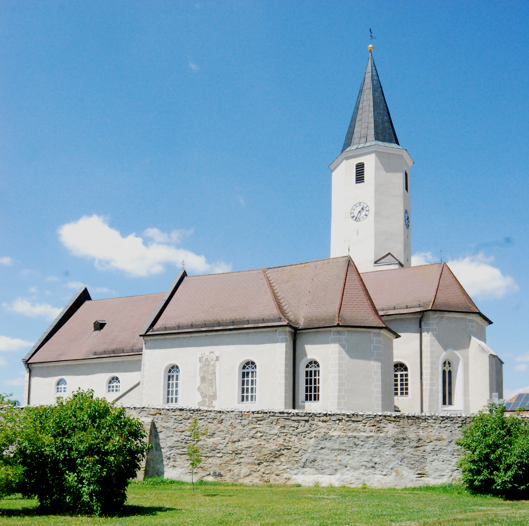 Pfarrkirche von Langau in Niederösterreich